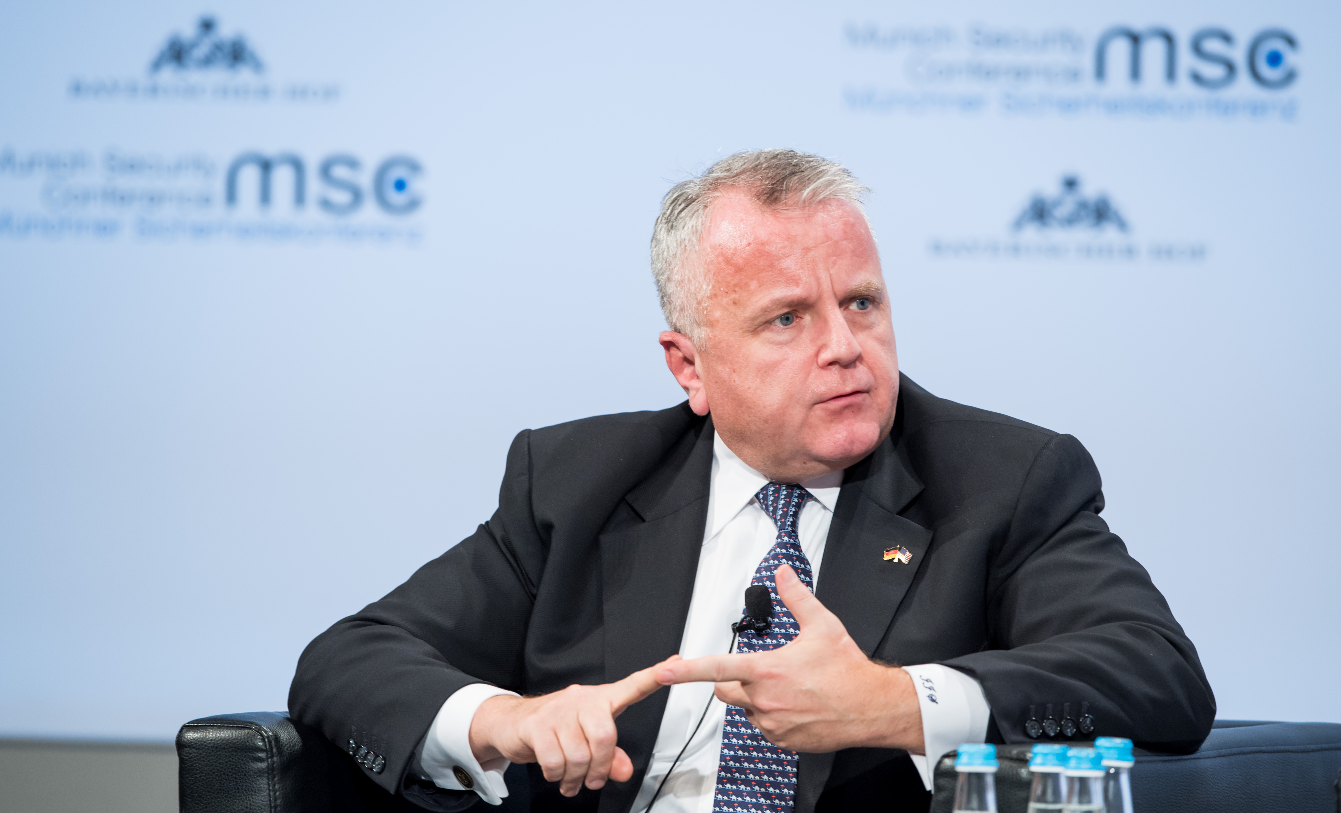 John Sullivan während der Münchener Sicherheitskonferenz 2018